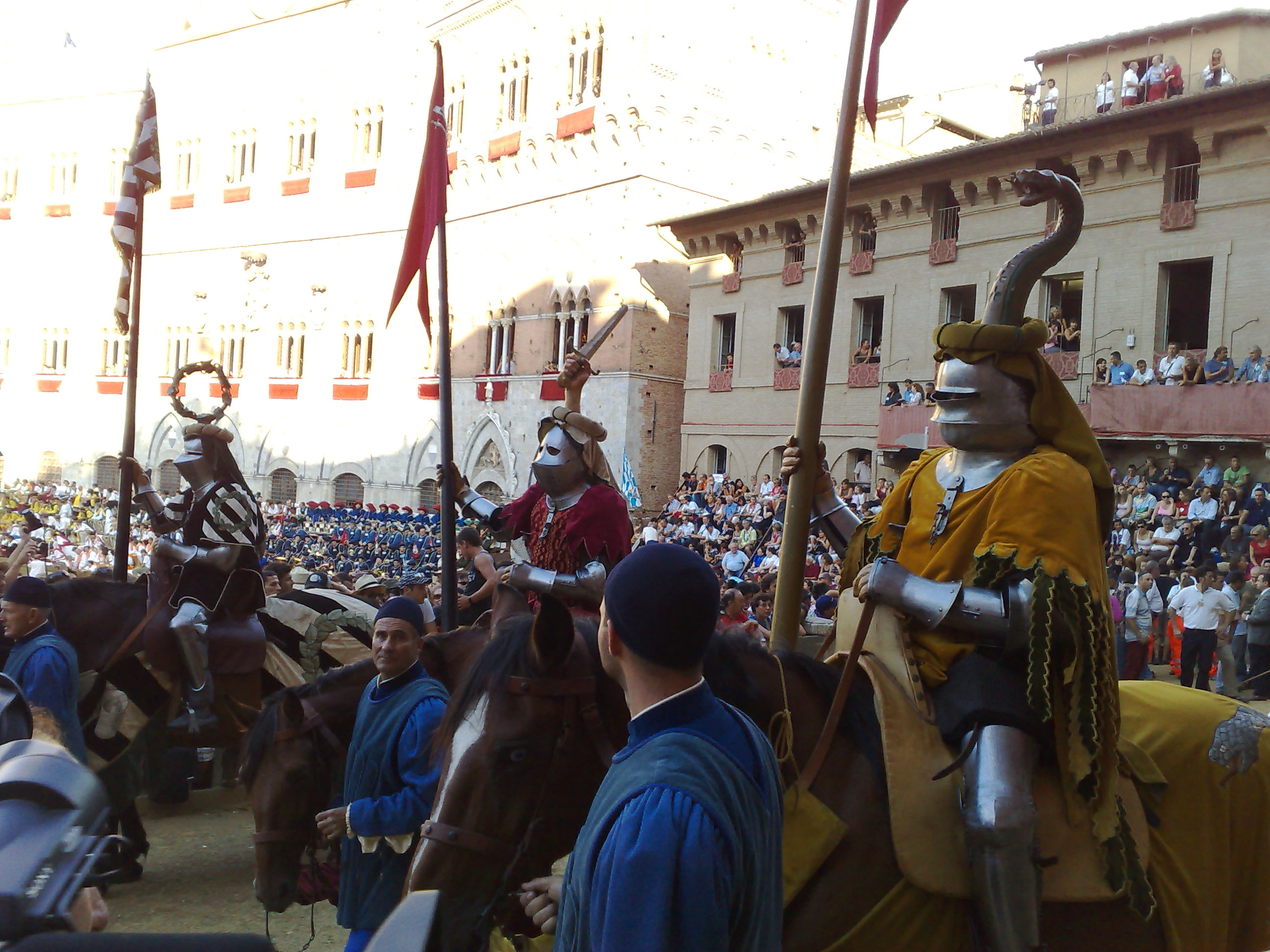 Procession